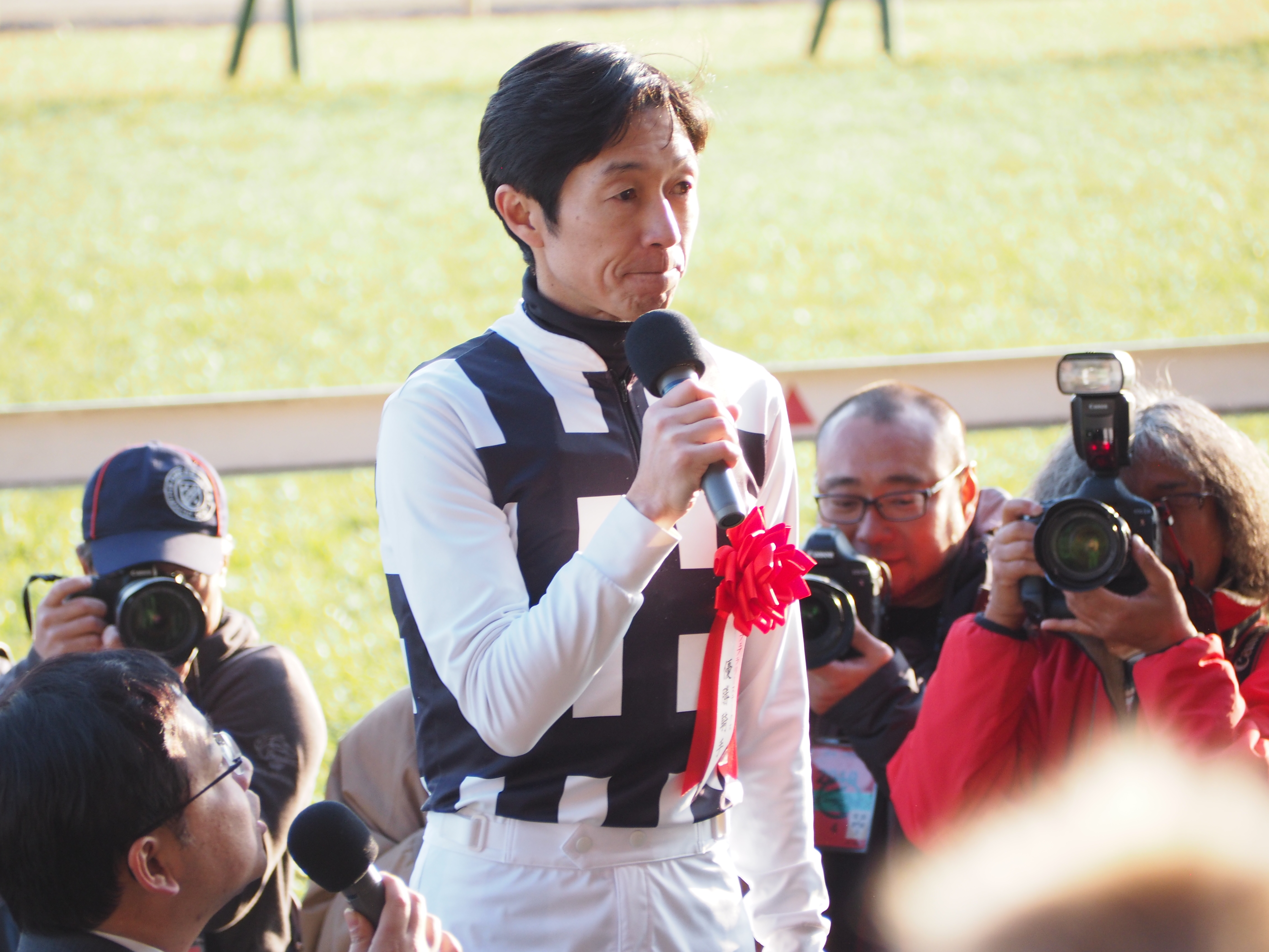 2019年のフェブラリーステークスを制した武豊がインタビューを受けている